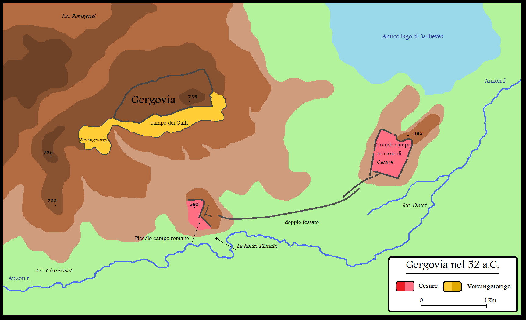 La battaglia di Gergovia del 52 a.C. (I fase)